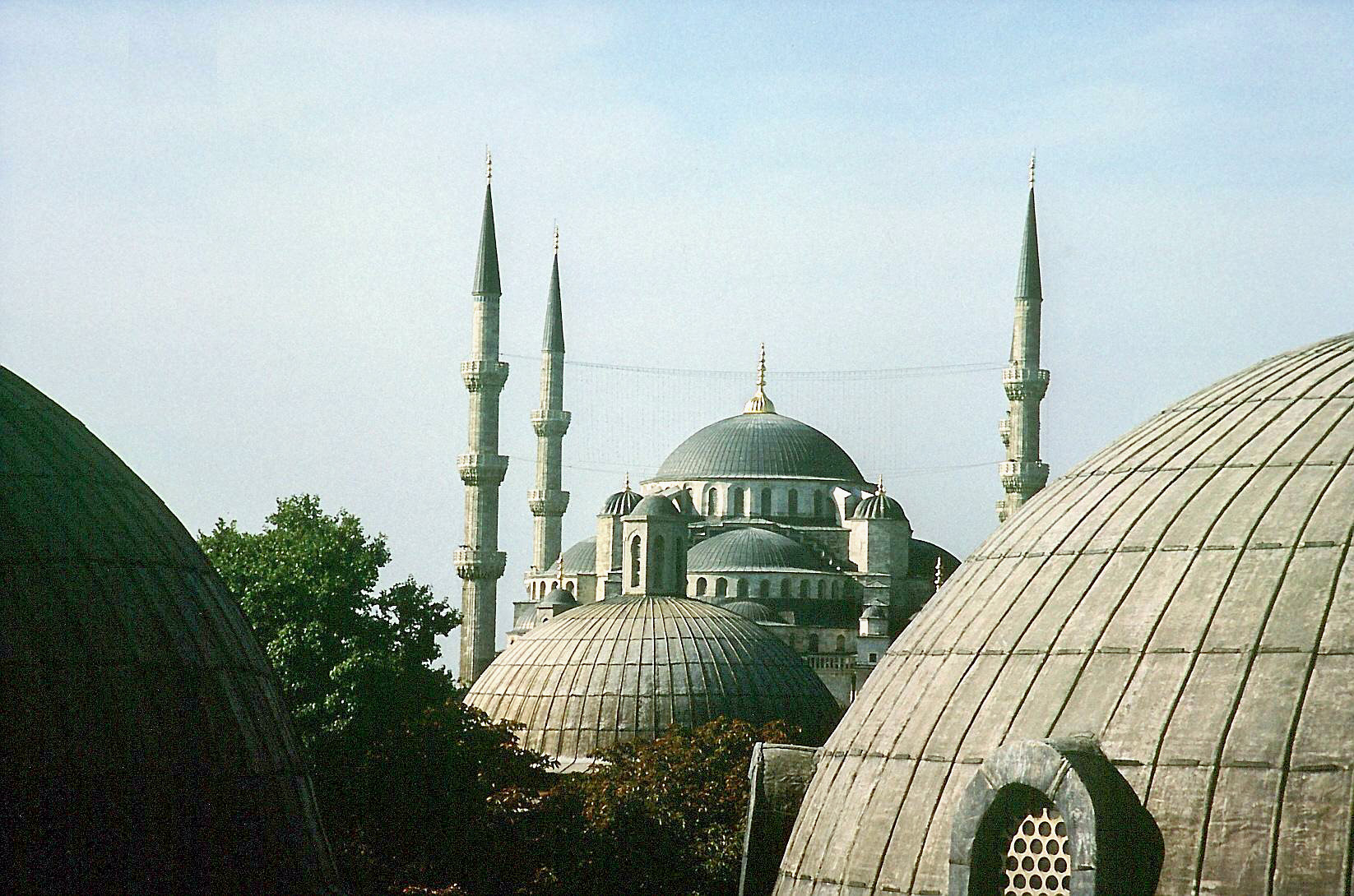 Blick über die Kuppel der Aya Sophia zur Sultan Ahmet Moschee